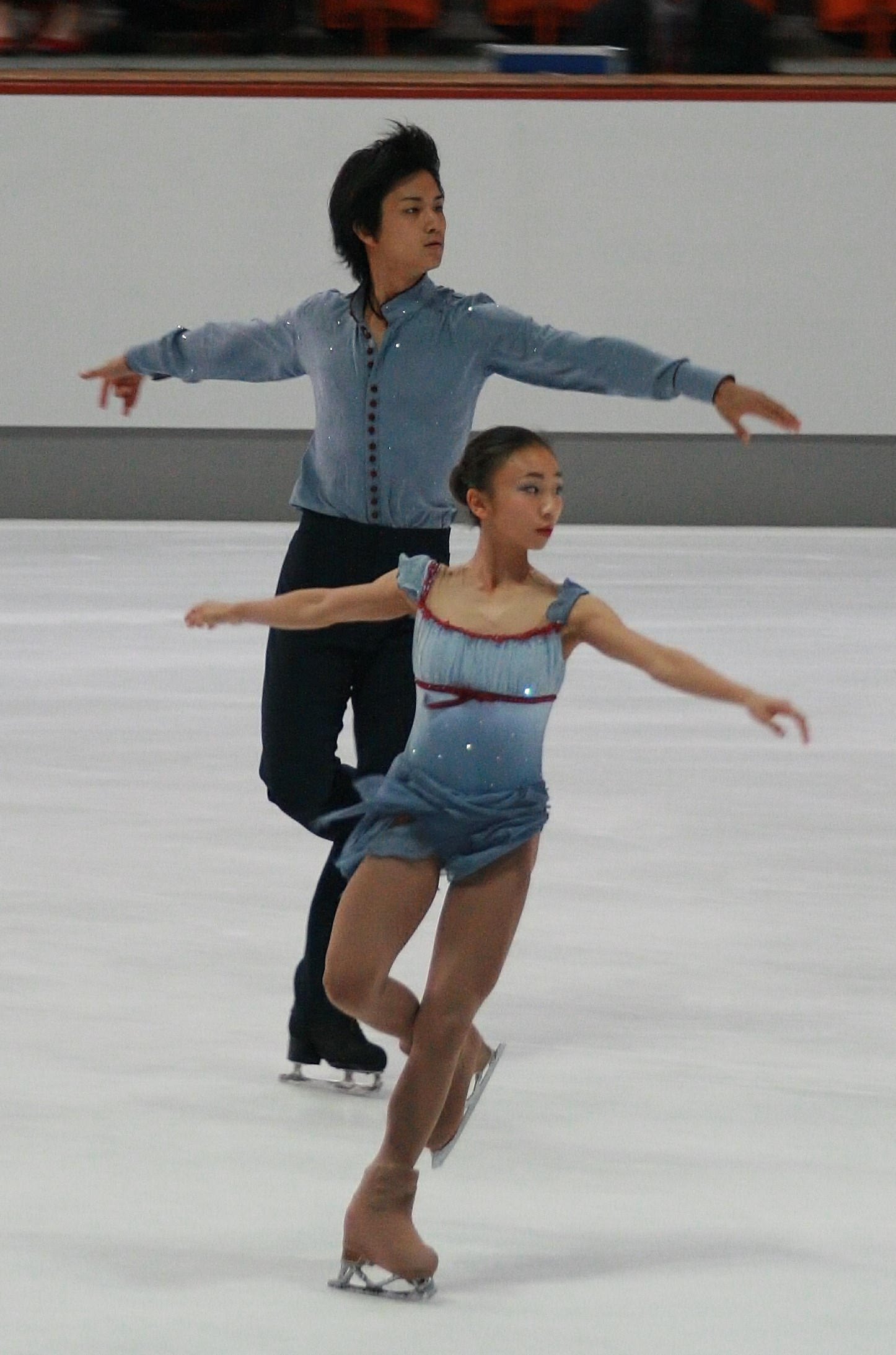 Наруми Такахаси и Риючи Кихара (Япония) на 2013 Nebelhorn Trophy